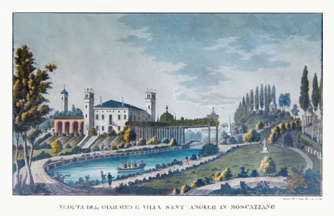 Veduta del giardino e villa Sant'Angelo in Moscazzano.